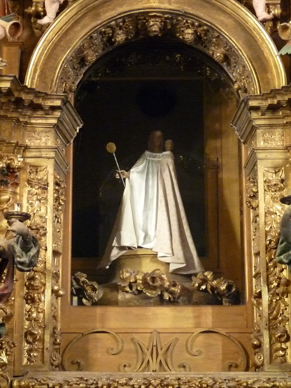 Vierge en bois pendant l'hiver, Ermitage de Font-Romeu, Pyrénées-Orientales, France